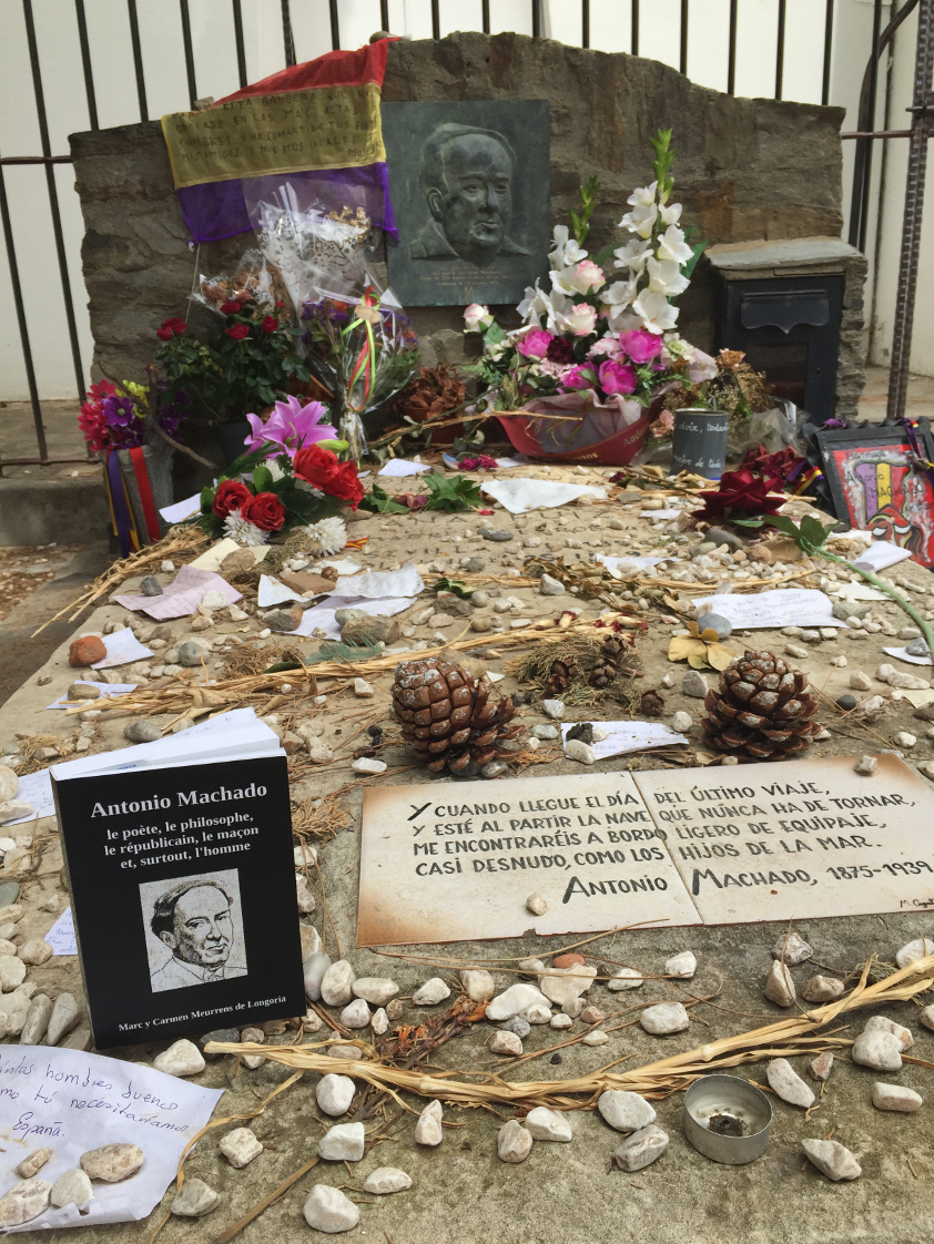 Tombe, à Collioure, d'Antonio Machado (1875-1939), le photographie (JMT) y ayant déposé le livre "Antonio Machado, le poète, le philosophe, le républicain, le maçon et, surtout, l'homme" (Marc y Carmen Meurrens de Longoria, 2014) légèrement entrouvert à la page 41 où est expliquée et interprétée la dernière strophe du poème "Retrato" (1908) reproduite sur la tombe.